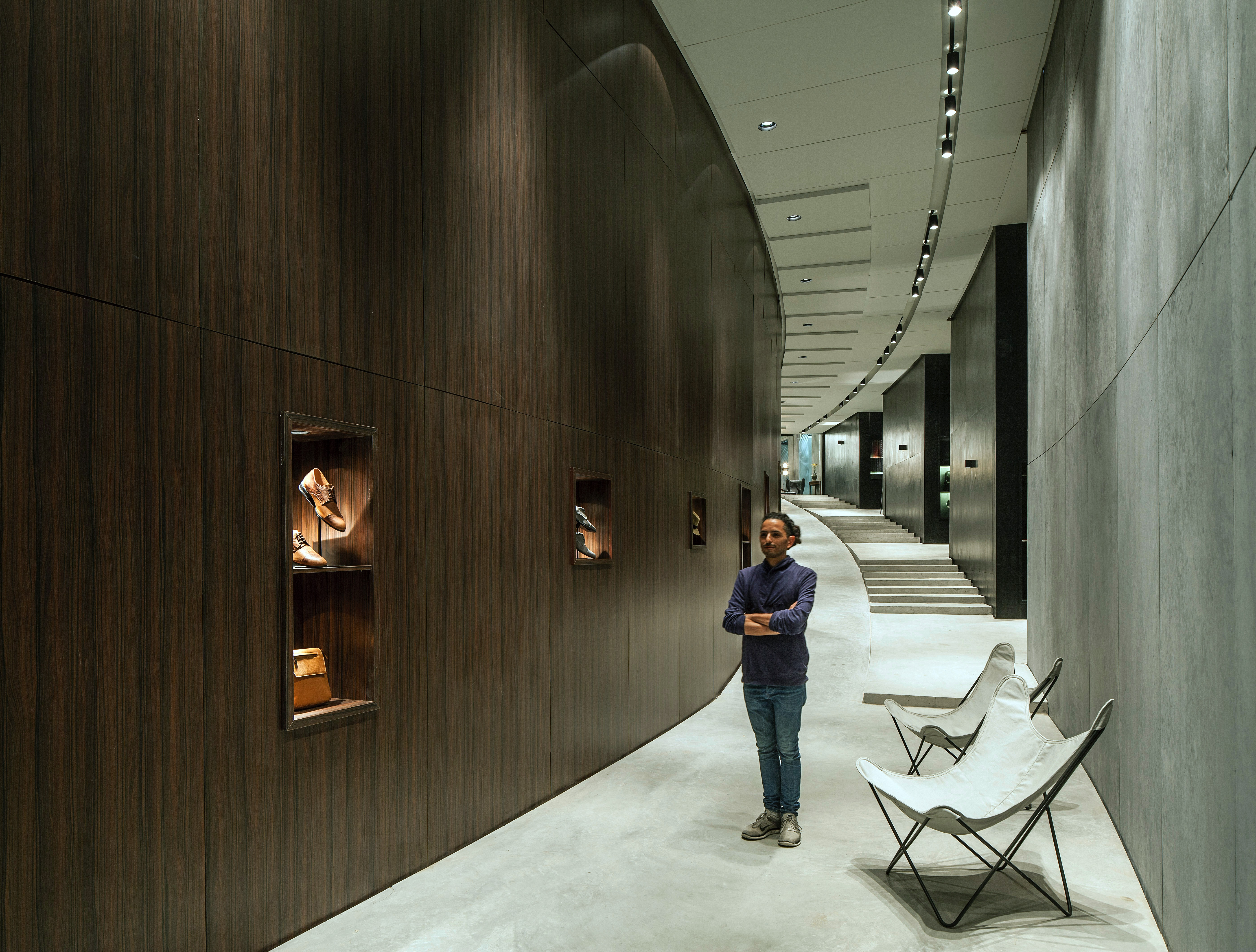 Production designer Arad Sawat on set during filming of Norman: The Moderate Rise and Tragic Fall of a New York Fixer